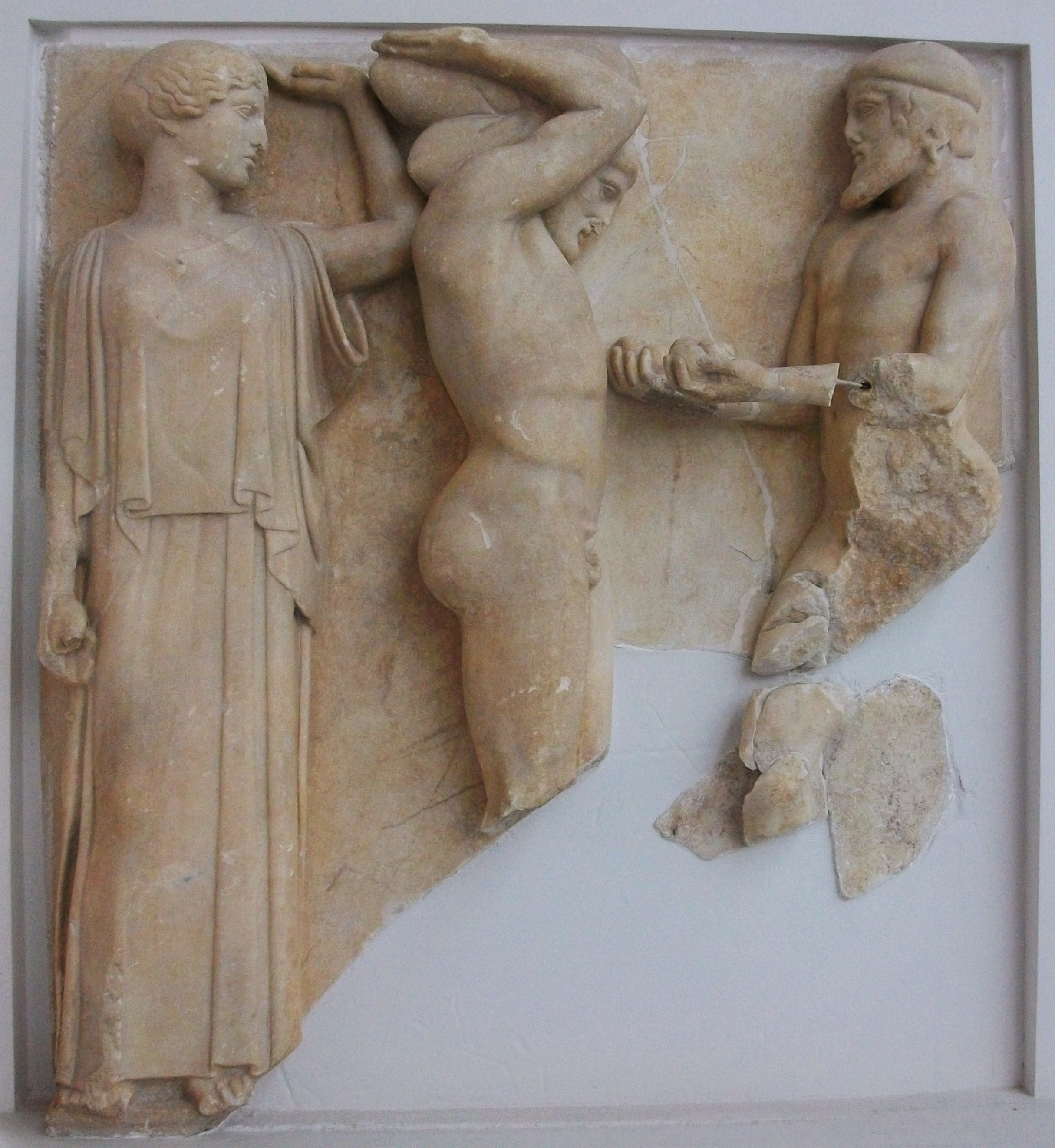 Mètopa del temple de Zeus d'Olímpia amb representació d'Hèracles i les pomes de les Hespèrides (Museu Arqueològic d'Olímpia).